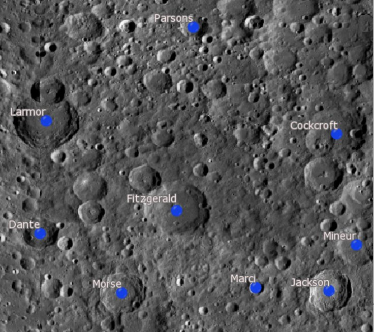 Cráter lunar FitzGerald. Localización. (Imagen LROC)